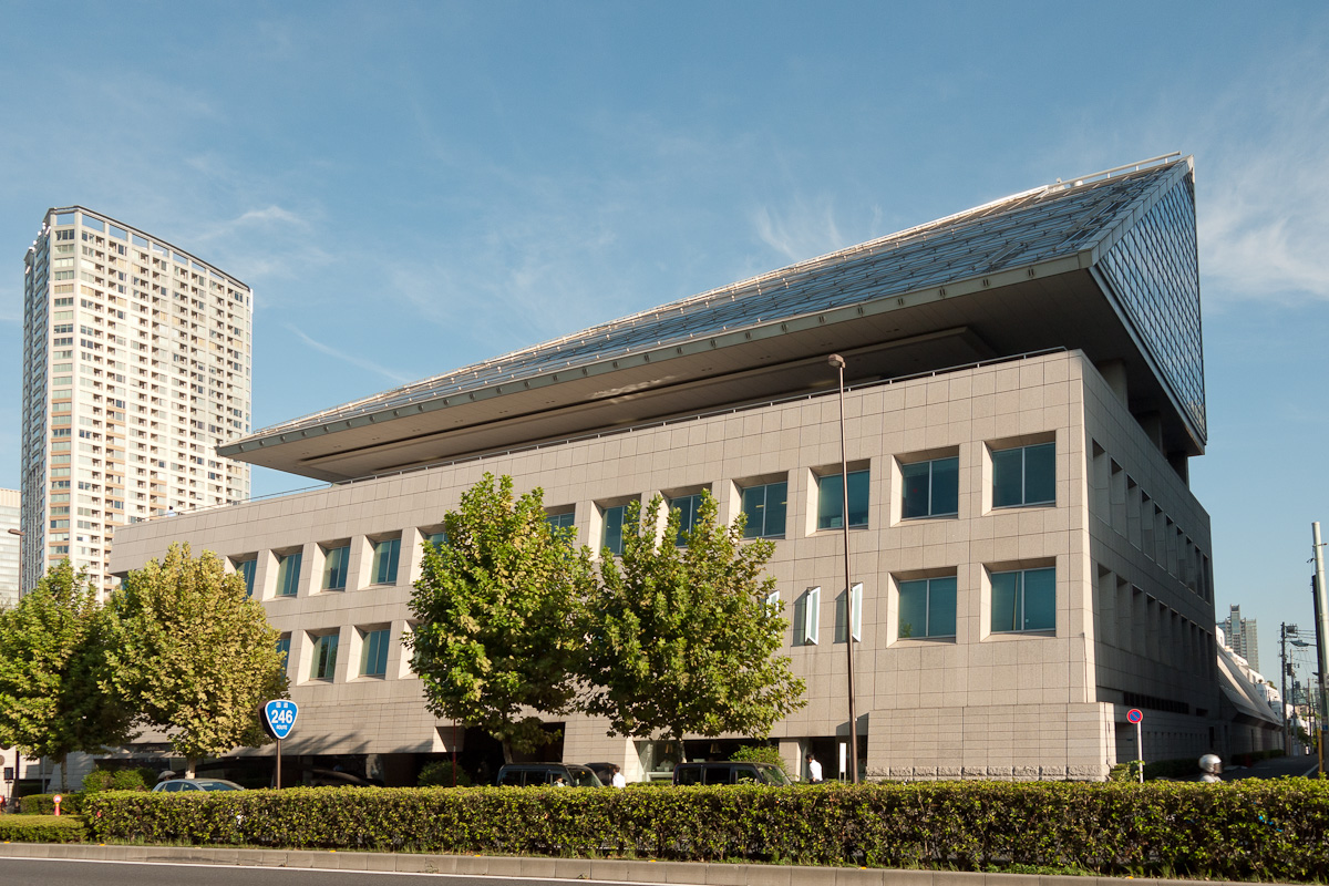 在日カナダ大使館、東京都港区赤坂7丁目。